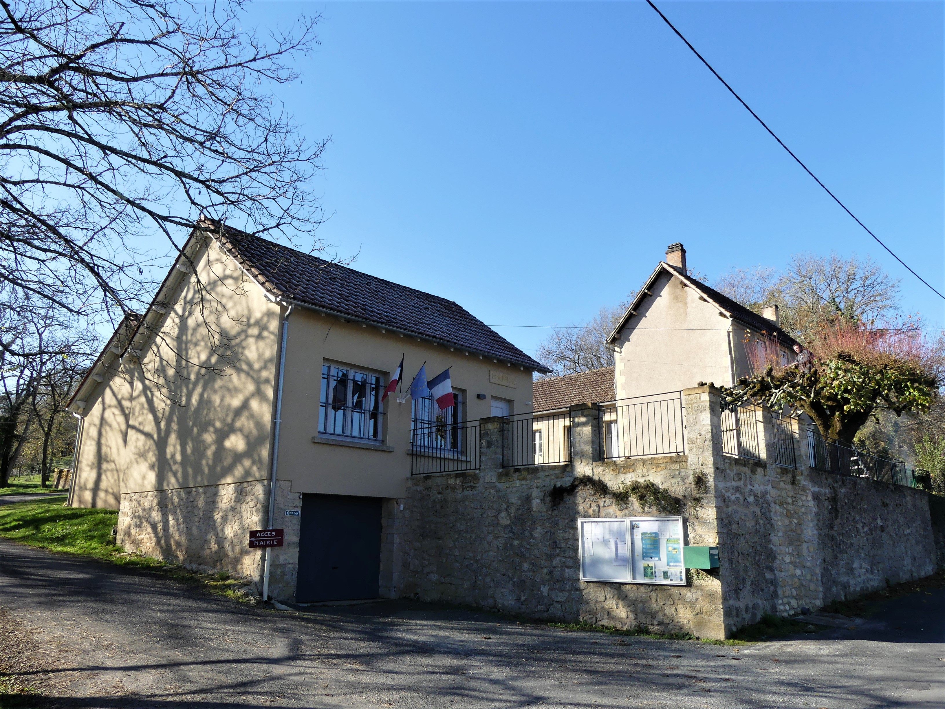 La mairie (à gauche) et l'ancienne mairie (à droite), Manaurie, Dordogne, France.